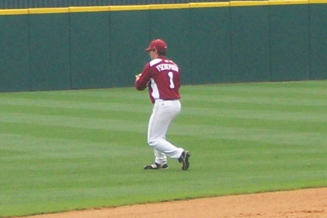 Ben Tschepikow fielding in 2009